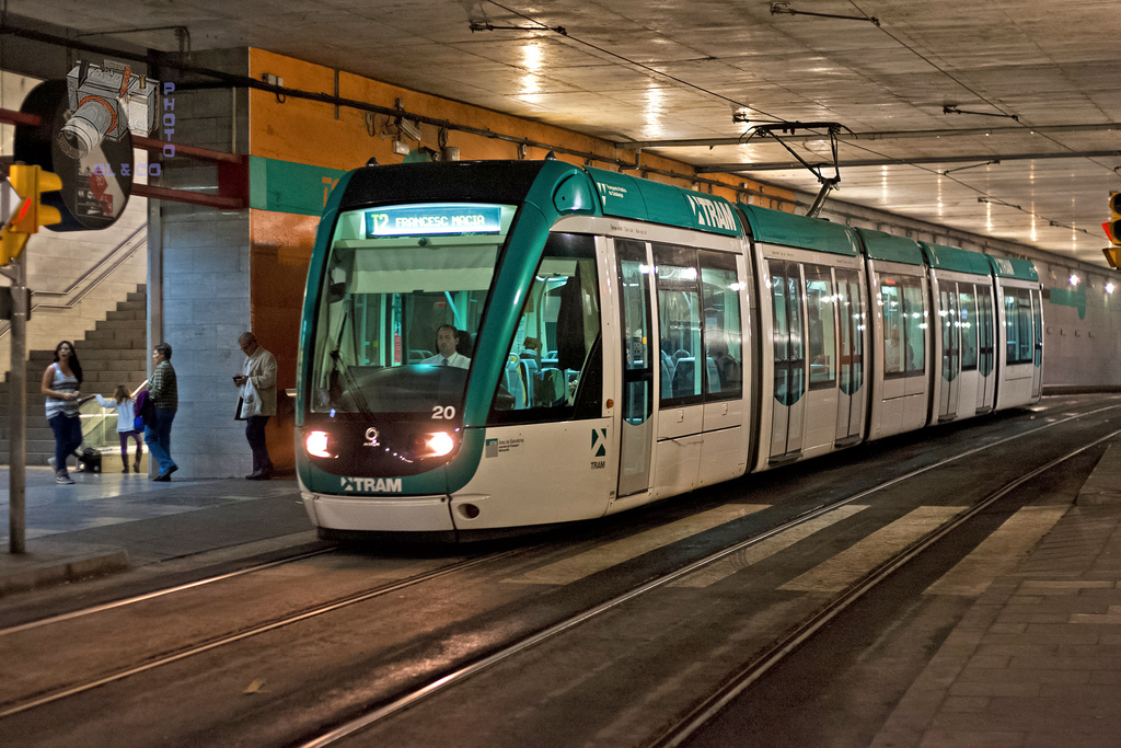 tranvía saliendo de la parada de Cornellà centre dirección Francesc Macià